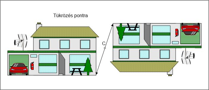 Geometriai transzformáció 2D-ben: középpontos tükrözés